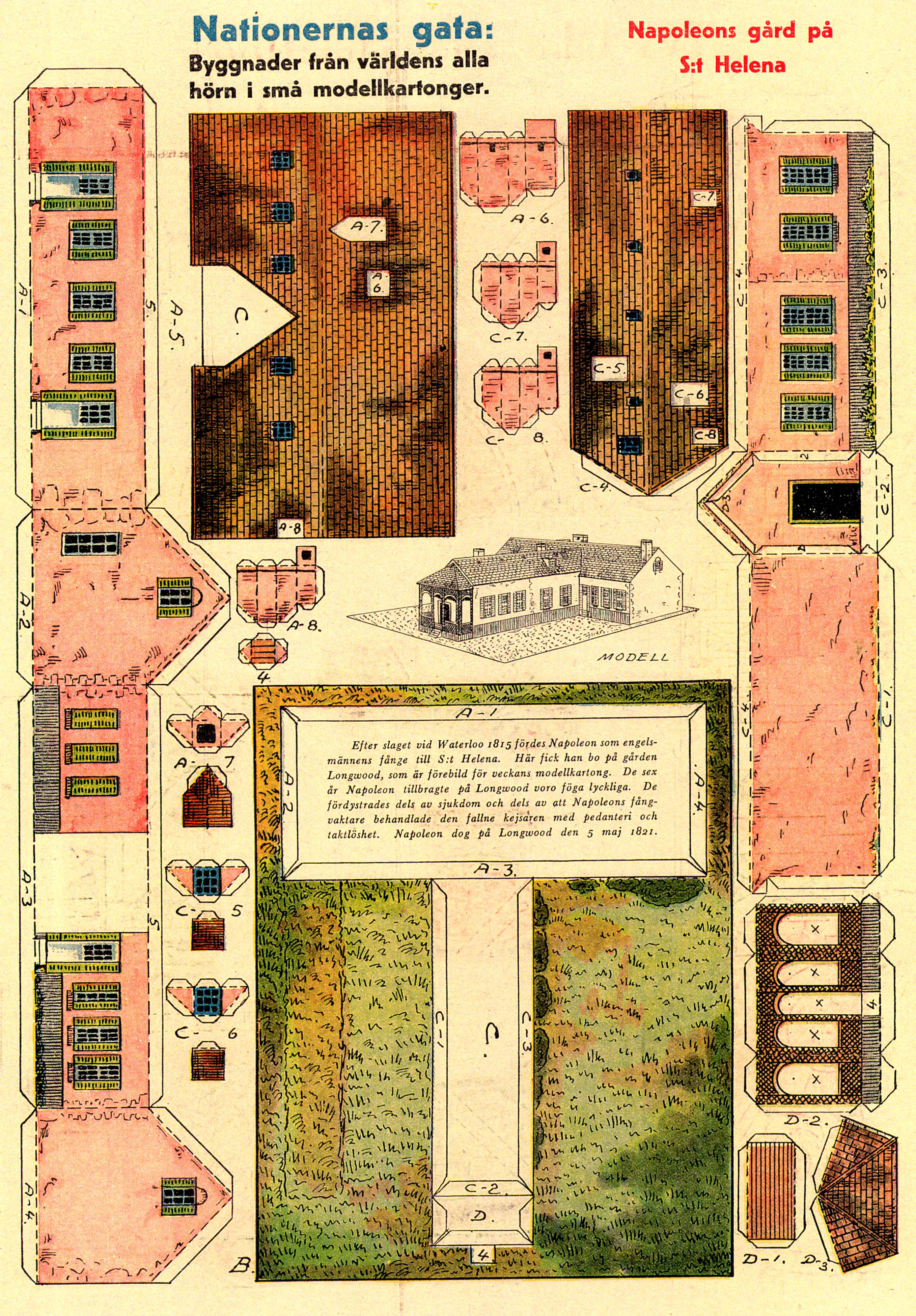 Detta klippark ingick i den större serie "Nationernas Gata" som HCMadsen ritade för Allers på 1930-talet. Det föreställer den gård på S:t Helena, där engelsmännen höll Napoleon fången 1815-1821.